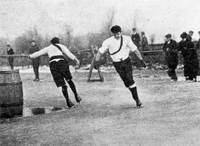 Fenskaters go around the barrel during fen skating competition